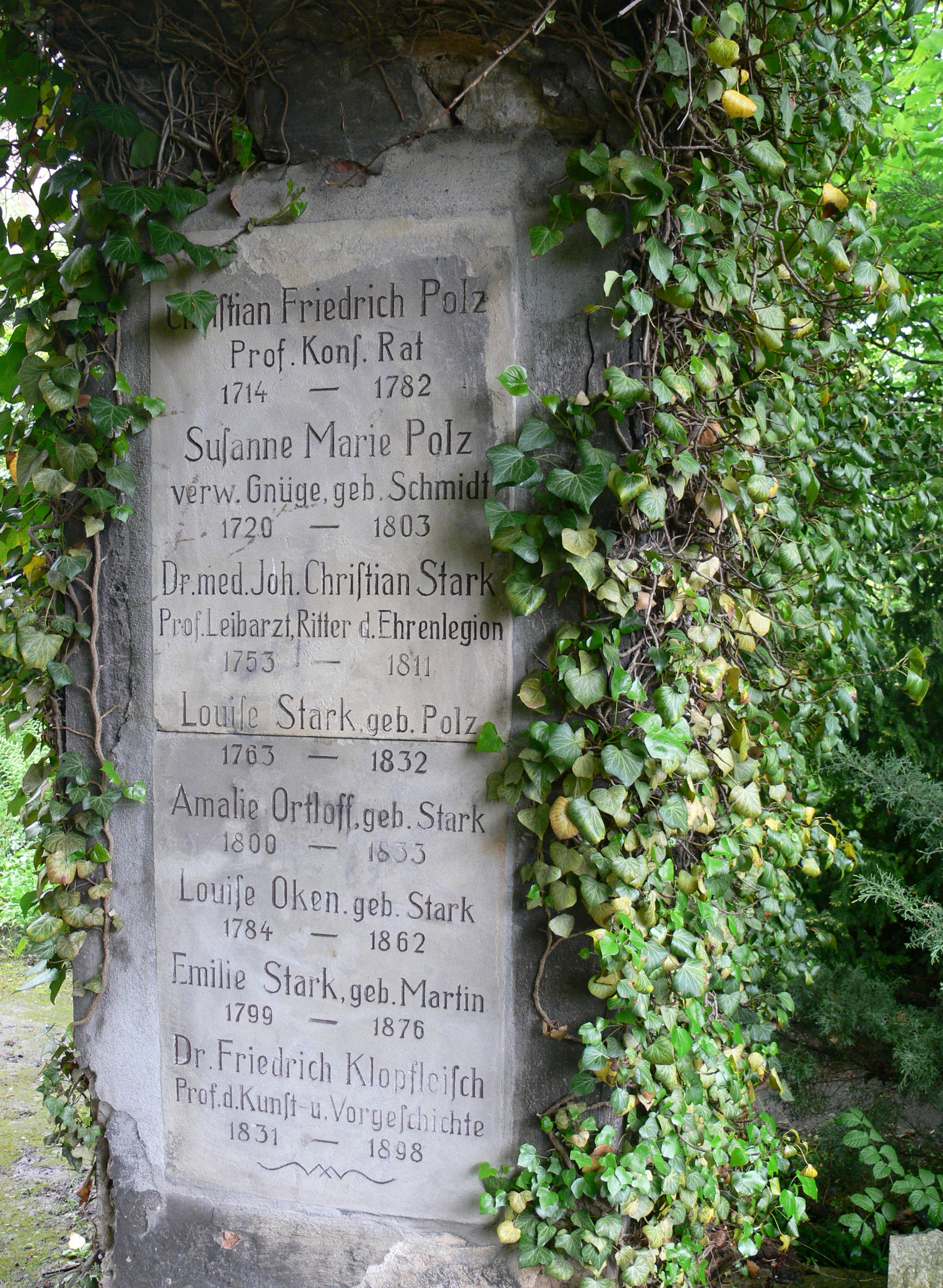 Jena, Johannisfriedhof Familiengrab Polz / Stark / Klopfleisch Christian Friedrich Polz, Prof., Kons. Rat (1714–1782) Susanne Marie Polz, verw. Gnüge, Geb. Schmidt (1720–1803) Dr. med. Joh. Christian Stark, Prof., Leibarzt, Ritter der Ehrenlegion (1753–1811) Louise Stark, geb. Polz (1763-1832) Amalie Ortloff, geb. Stark (1800–1833) Louise Oken, geb. Stark (1784–1862) Emilie Stark, geb. Martin (1799-1876) Dr. Friedrich Klopfleisch, Prof. der Kunst- und Vorgeschichte (1831–1898) siehe auch File:Jena_Johannisfriedhof_Polz Stark Klopfleisch 2.jpg